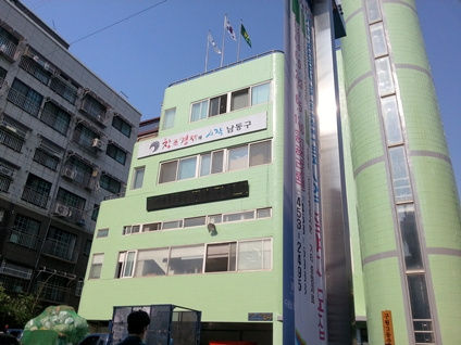 구월3동 주민센터